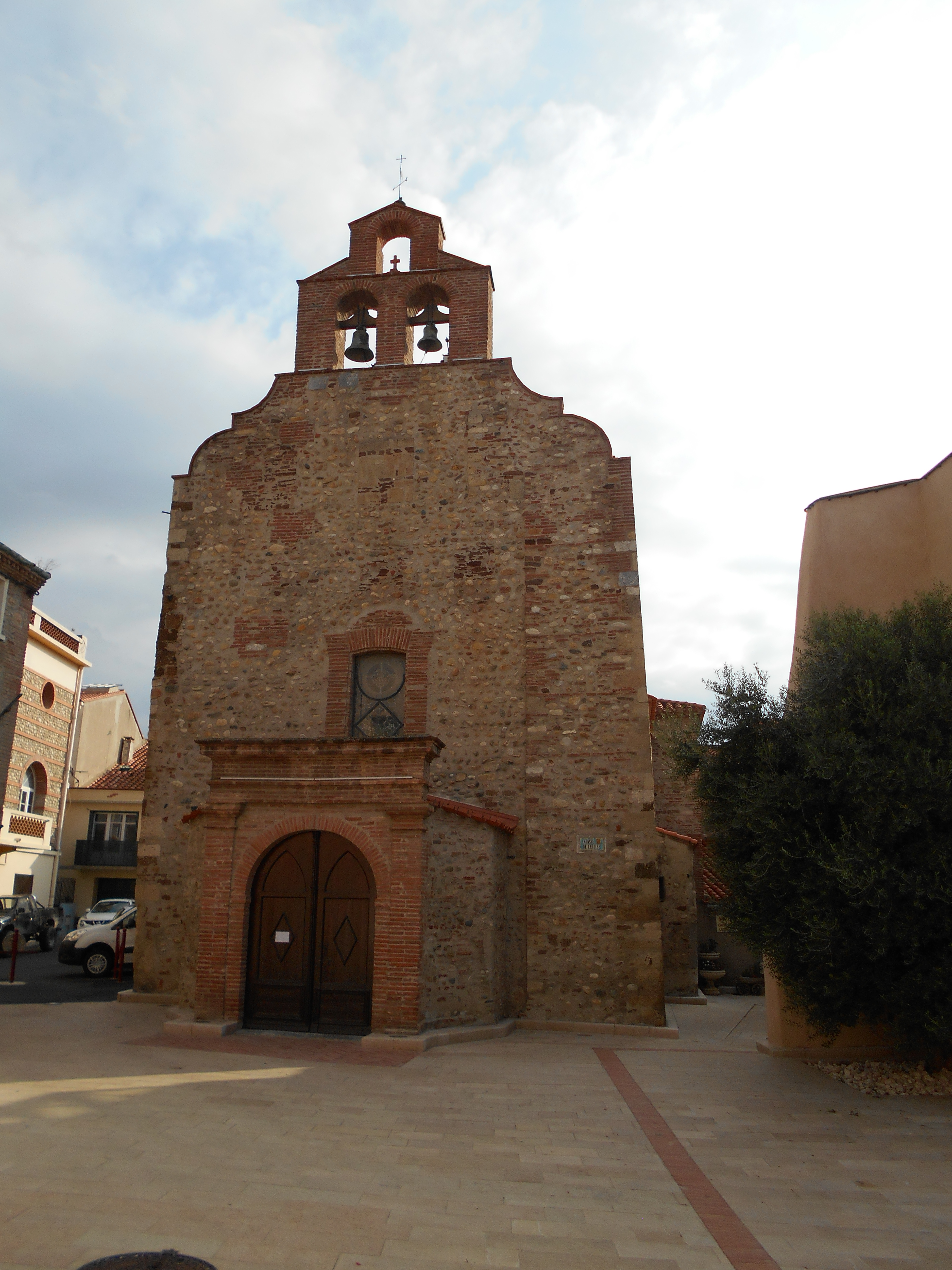 Façana de ponent de Sant Vicenç de Baó